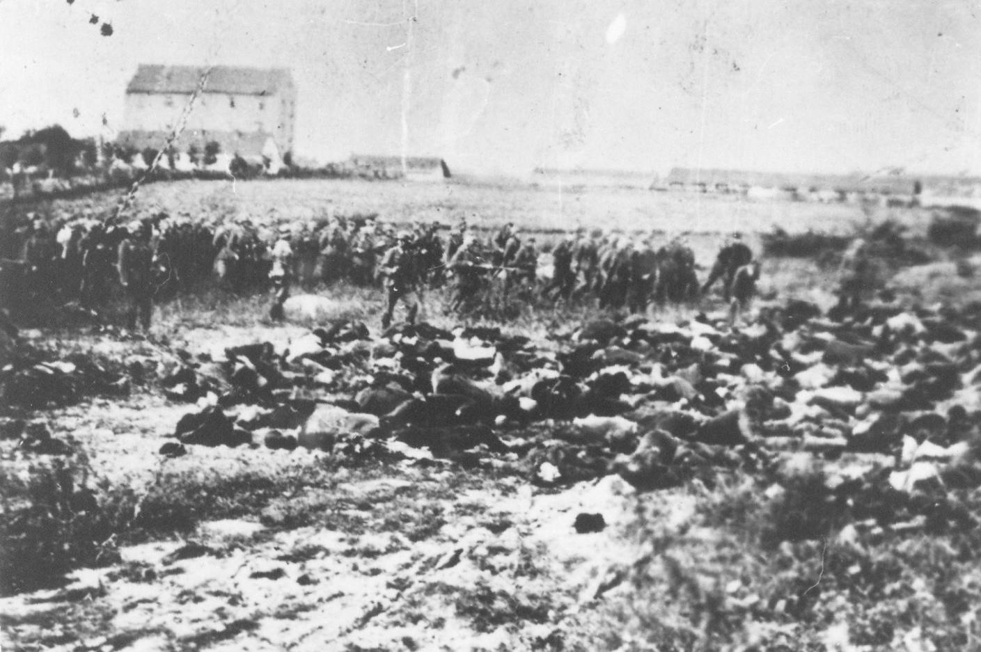 Truppe tedesche impegnate in esecuzioni di massa durante le operazioni antipartigiane del 1941